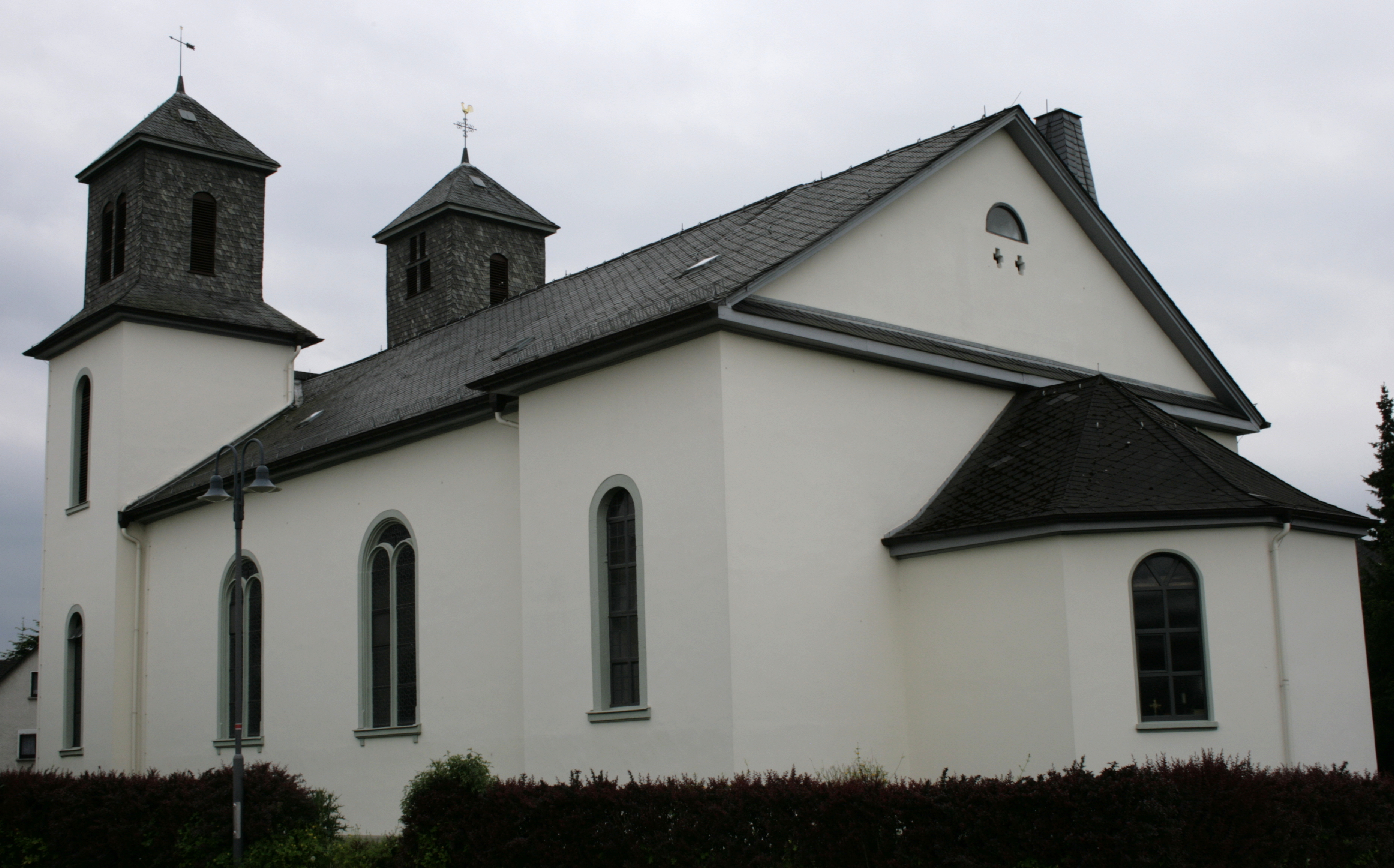 Pfarrkirche St. Lambertus in Arfurt, Deutschland, Apsisseite